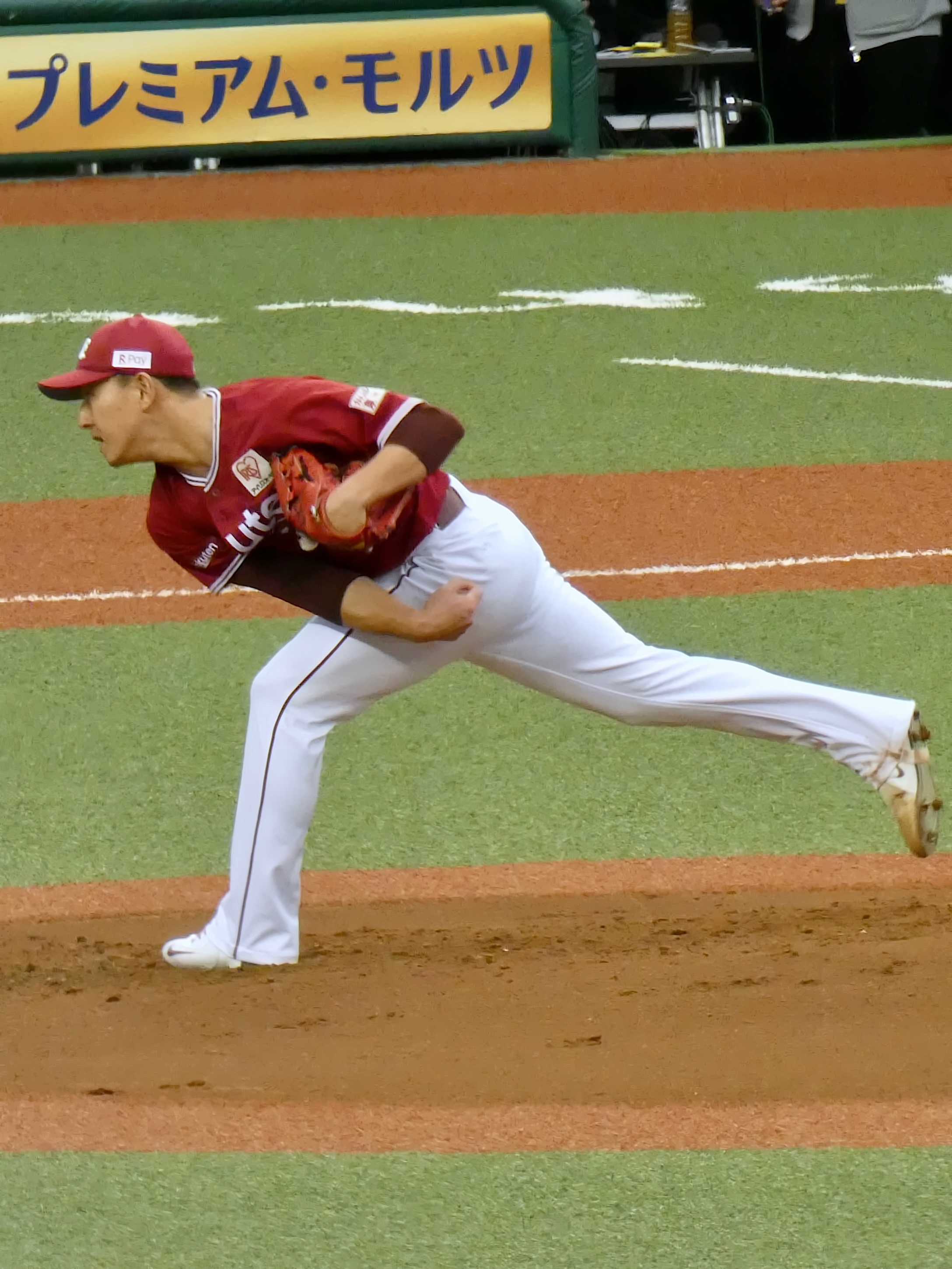 東北楽天ゴールデンイーグルスの選手「福井優也」。メットライフドームにて。